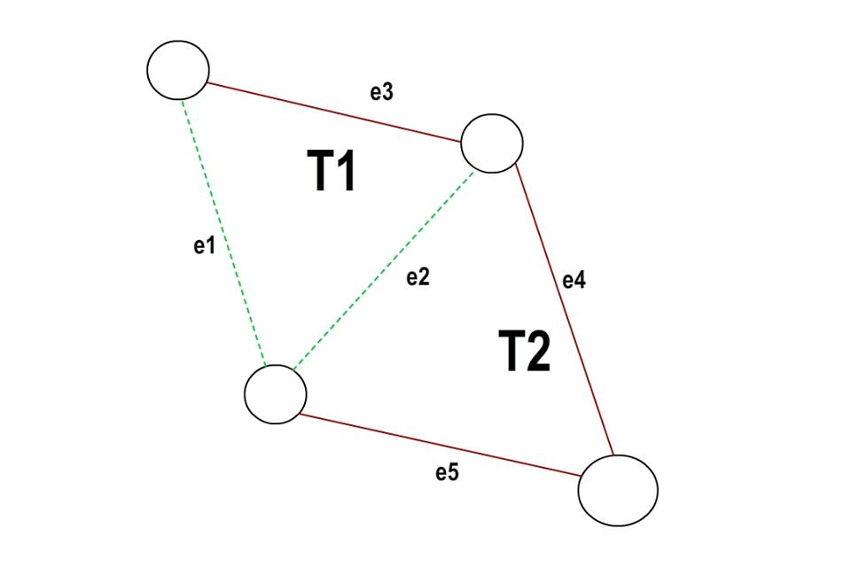 Grafo base para ejemplo demostración.